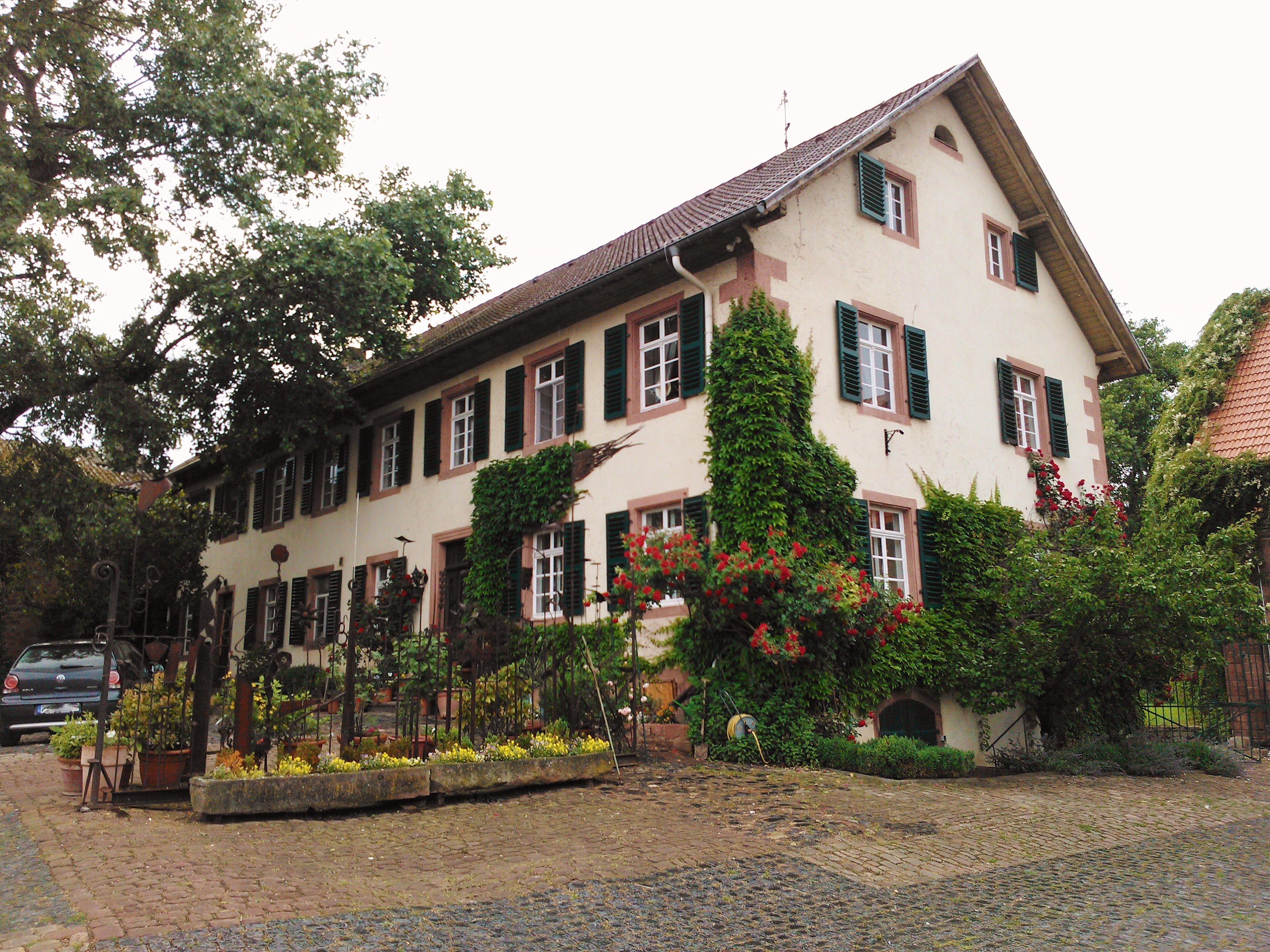 Das Wohnhaus der Anlage